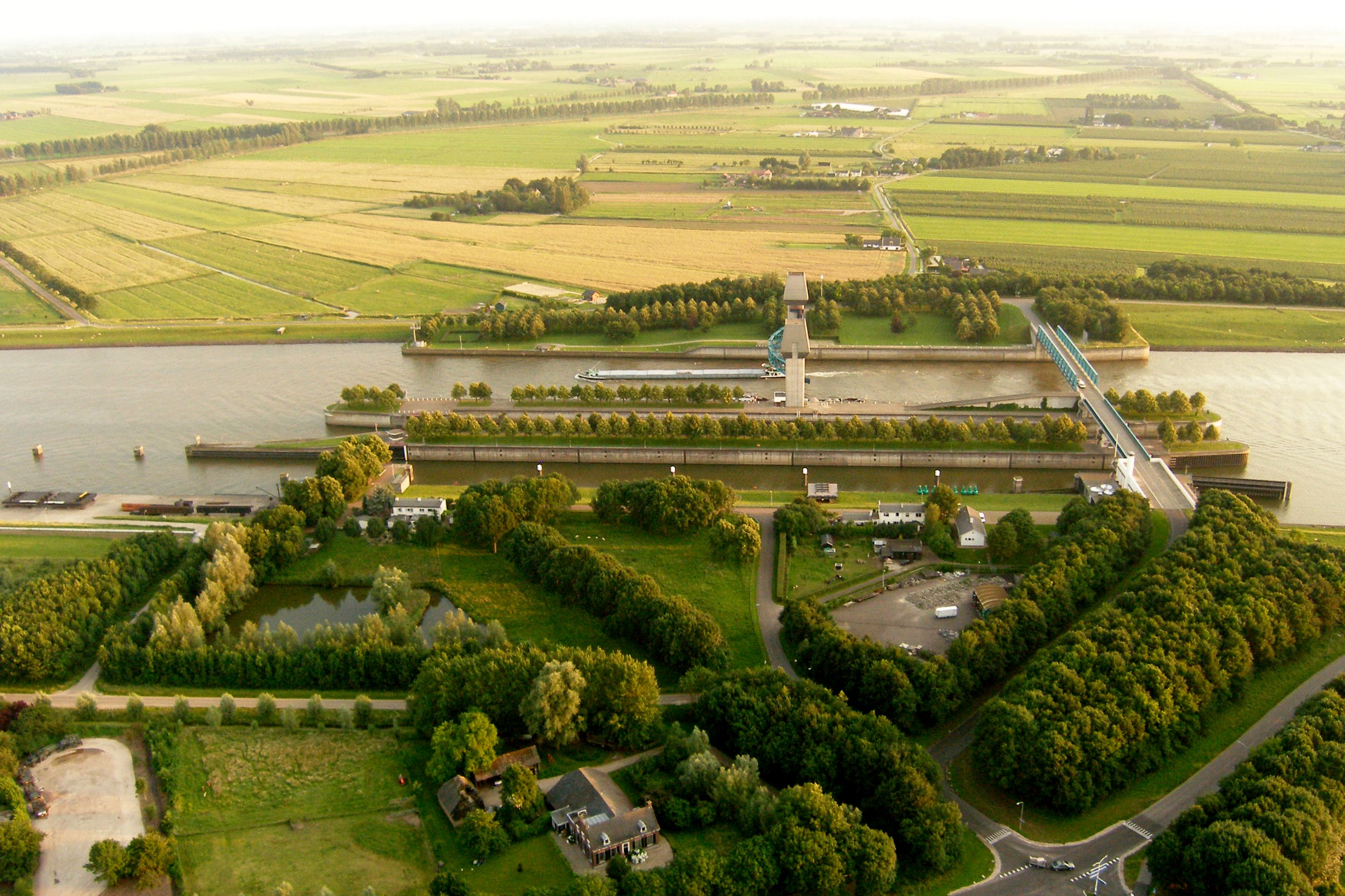 Prinses Marijkesluizen (canal locks) near Ravenswaaij.